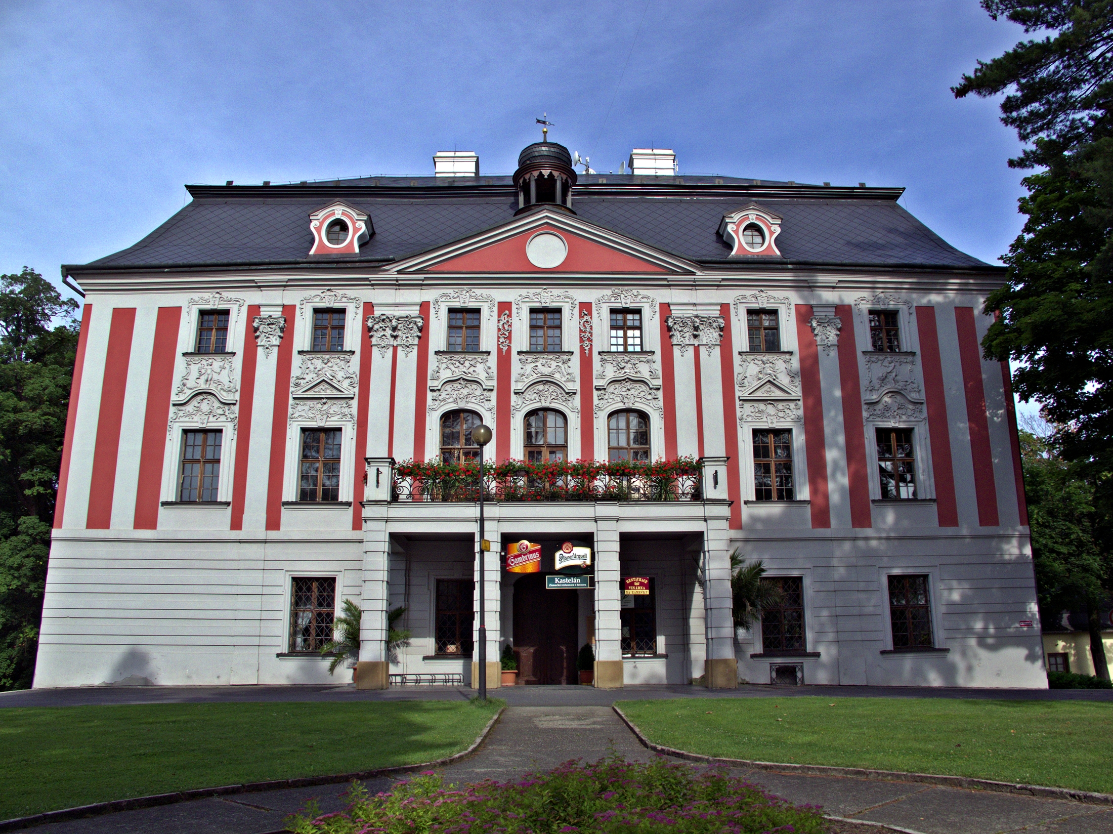 Zámek Velké Hoštice, Zámecká 197, Velké Hoštice.